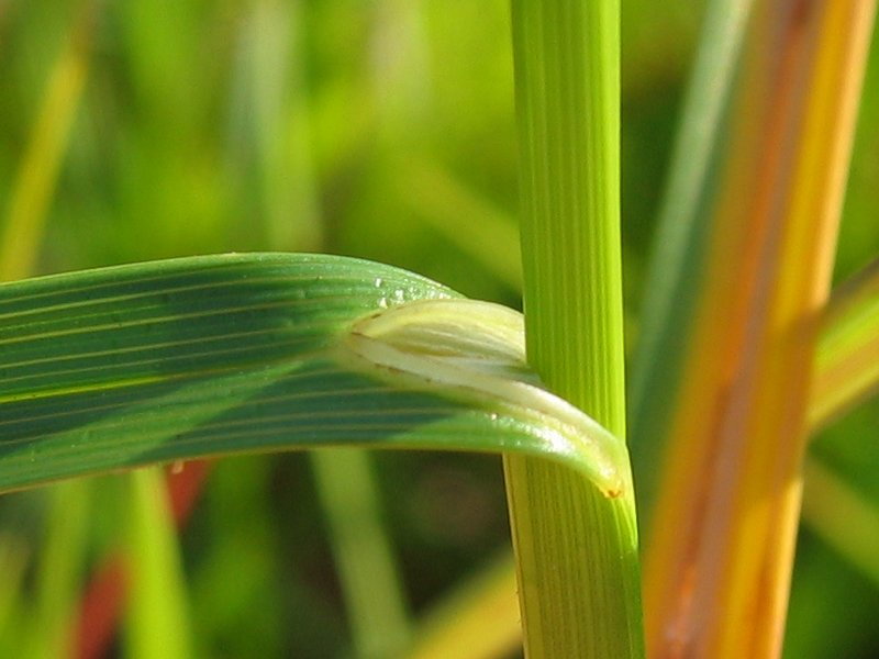 Hasenpfoten-Segge Carex ovalis, FFH-Wiese